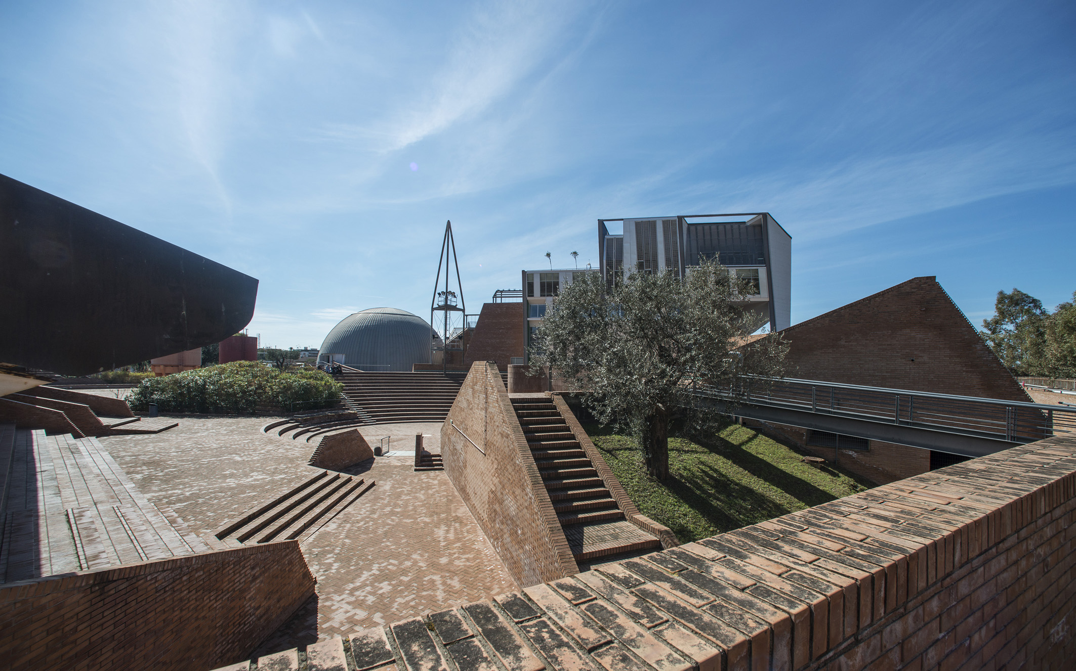 Veduta del complesso Corporea sito nella Città della Scienza di Bagnoli. Progettato da Pica Ciamarra Associati tra il 2003 e il 2017